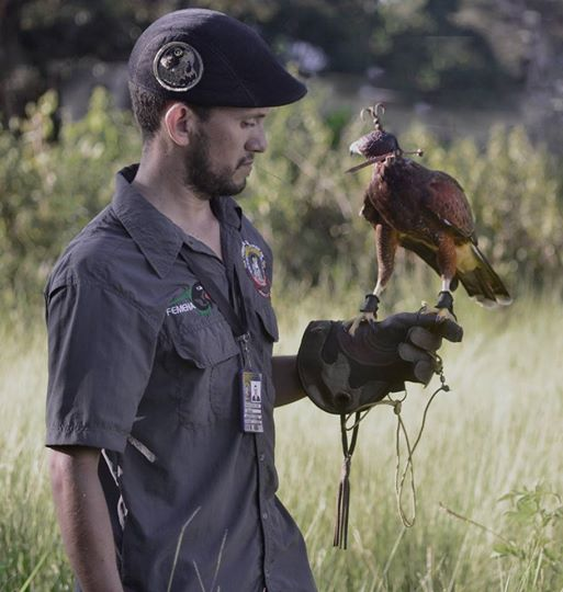 Un águila de harris en las manos de un cetrero venezolano, esta especie es la mas usada en la cetrería de Venezuela